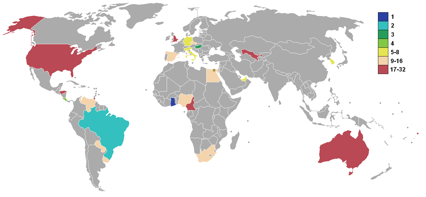 Copa disputada en Egipto.